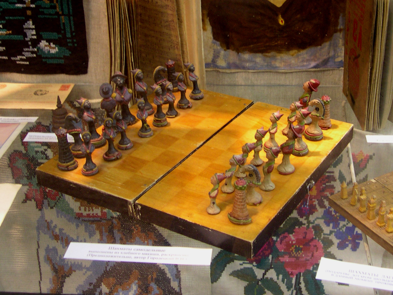 Шахматы, сделанные из хлебного мякиша заключённым. Воркутинский межрайонный краеведческий музей.